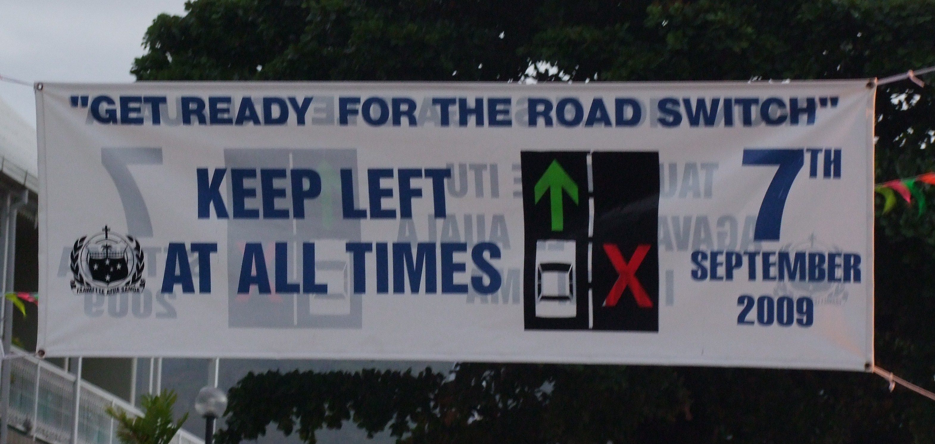 Plakat in Apia, das die Bevölkerung auf den bevorstehenden Wechsel von Rechts- auf Linksverkehr vorbereiten soll, vgl. Samoa#Verkehr